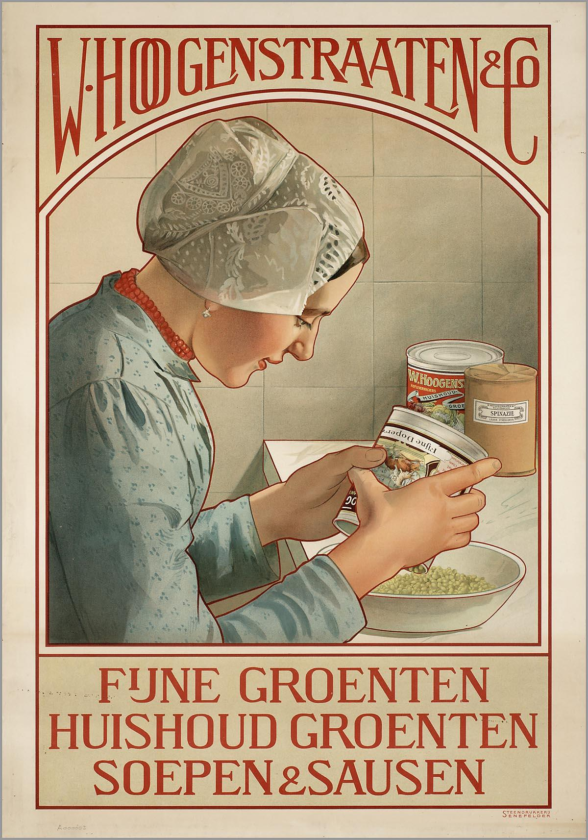 Affiche. "W. Hoogenstraaten & Co. Fijne groenten, Huishoudgroenten Soepen en Sausen".